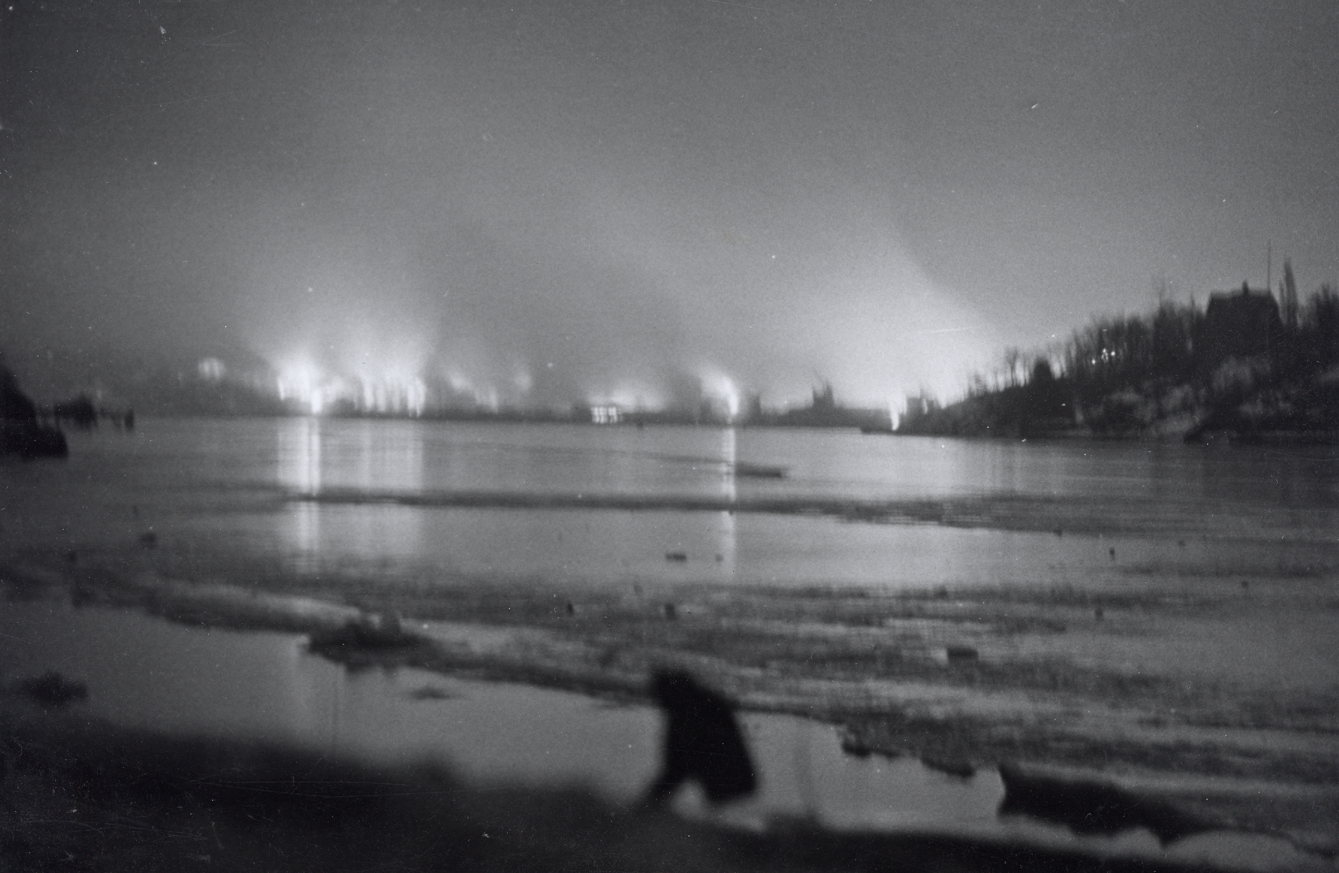 Format: Fotopositiv Dato / Date: 19 Desember 1943 Fotograf / Photographer: R. Kamrath-Lied Sted / Place: Frognerstranda, Oslo Wikipedia: Filipstad-ulykken NRK: Eksplosjonen på Filipstad Eier / Owner Institution: Trondheim byarkiv, The Municipal Archives of Trondheim Arkivreferanse / Archive reference: F9713 Filipstadulykken 19 desember 1943. Fra Frognerstranda klokken 16.30-16.45. Bildet stammer antageligvis fra tidligere brannsjef Kai Nielsen v/Trondheim brannvesen. Nielsen var brannsjef ca. 1951 - 1981. Fra Trondheim Brannvesens arkiv.